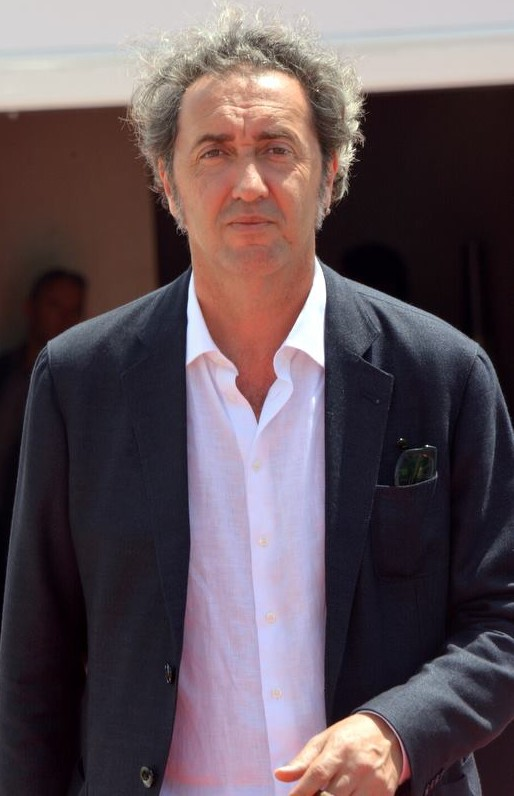 Paolo Sorrentino au festival de Cannes